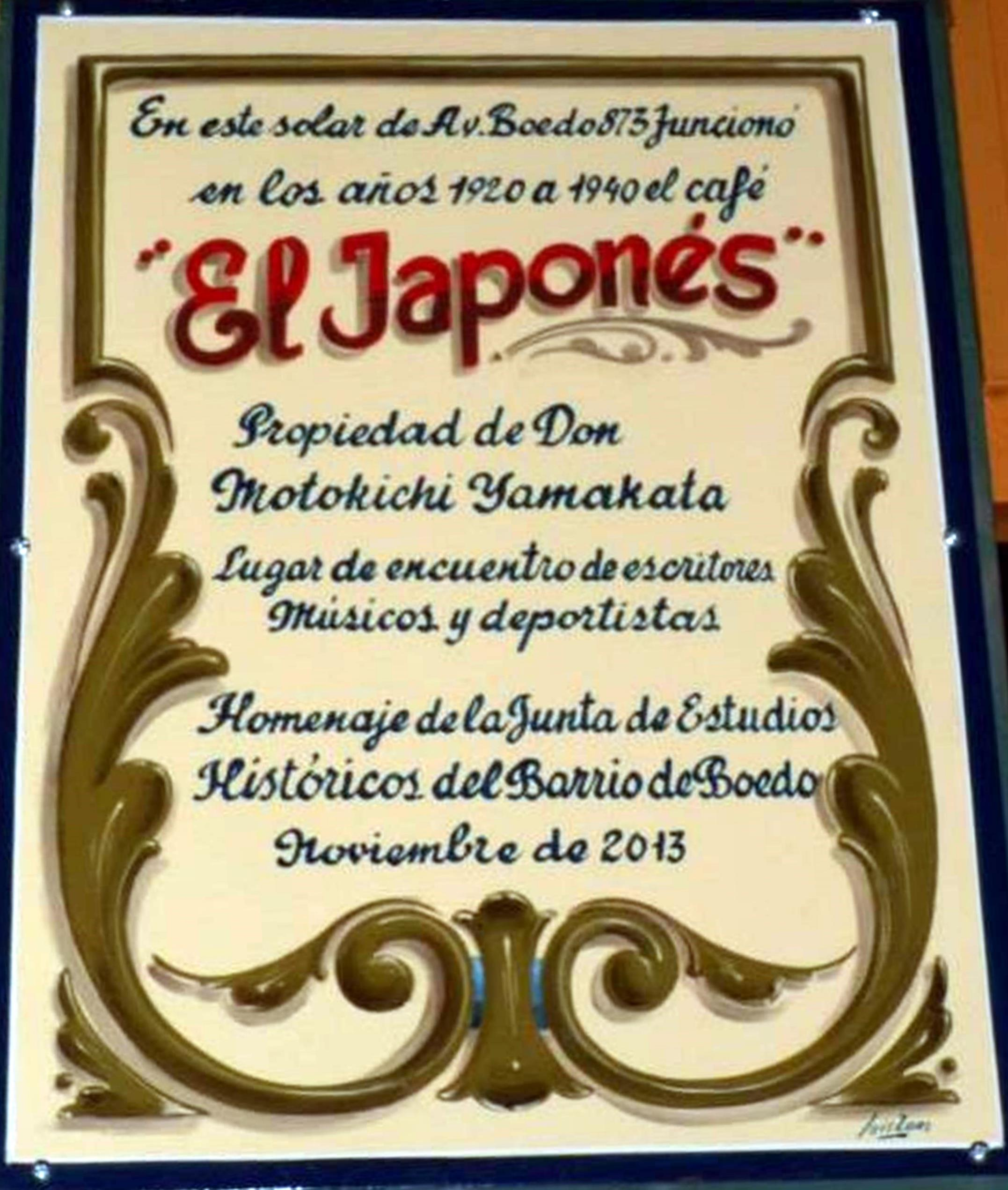 Placa homenaje al café "El Japonés" de Boedo 873 instalada por la Junta de estudios Históricos de Boedo.